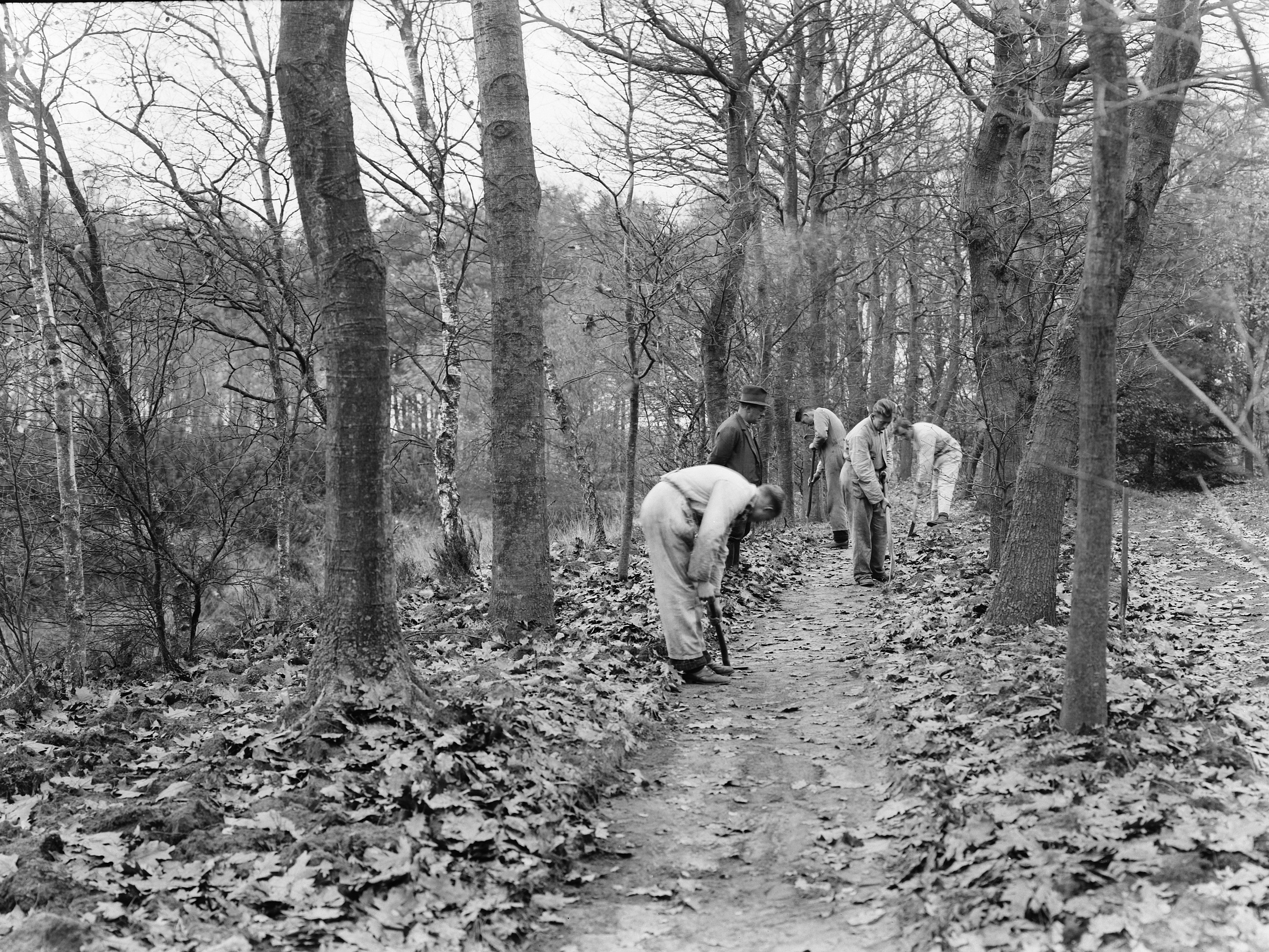 Collectie / Archief : Fotocollectie Nederlandse Heidemaatschappij Reportage / Serie : [ onbekend ] Beschrijving : werkkampen, mensen, fietspaden, schoonmaken, t wijde veld Datum : ongedateerd Locatie : Ede Trefwoorden : fietspaden, mensen, schoonmaken, werkkampen Persoonsnaam : t wijde veld Fotograaf : [onbekend] Auteursrechthebbende : Nationaal Archief Materiaalsoort : Glasnegatief Nummer archiefinventaris : bekijk toegang 2.24.06.02 Bestanddeelnummer : 162-1354